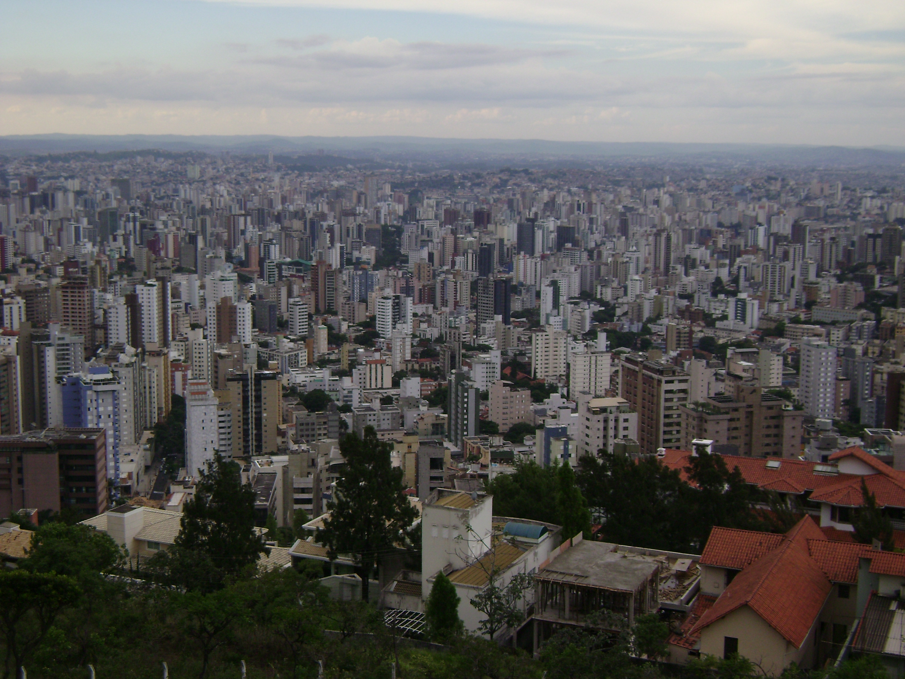 Vista da região Centro-Sul de Belo Horizonte (no Brasil) através de um mirante entre as ruas Alcides Pereira Lima e rua Ministro Vilas Boas, no bairro Mangabeiras. É possível ver o edifício do Chevrolet Hall na posição centro-esquerda da imagem, ao lado esquerdo do que parece ser a Avenida Cristóvão Colombo (na Savassi).